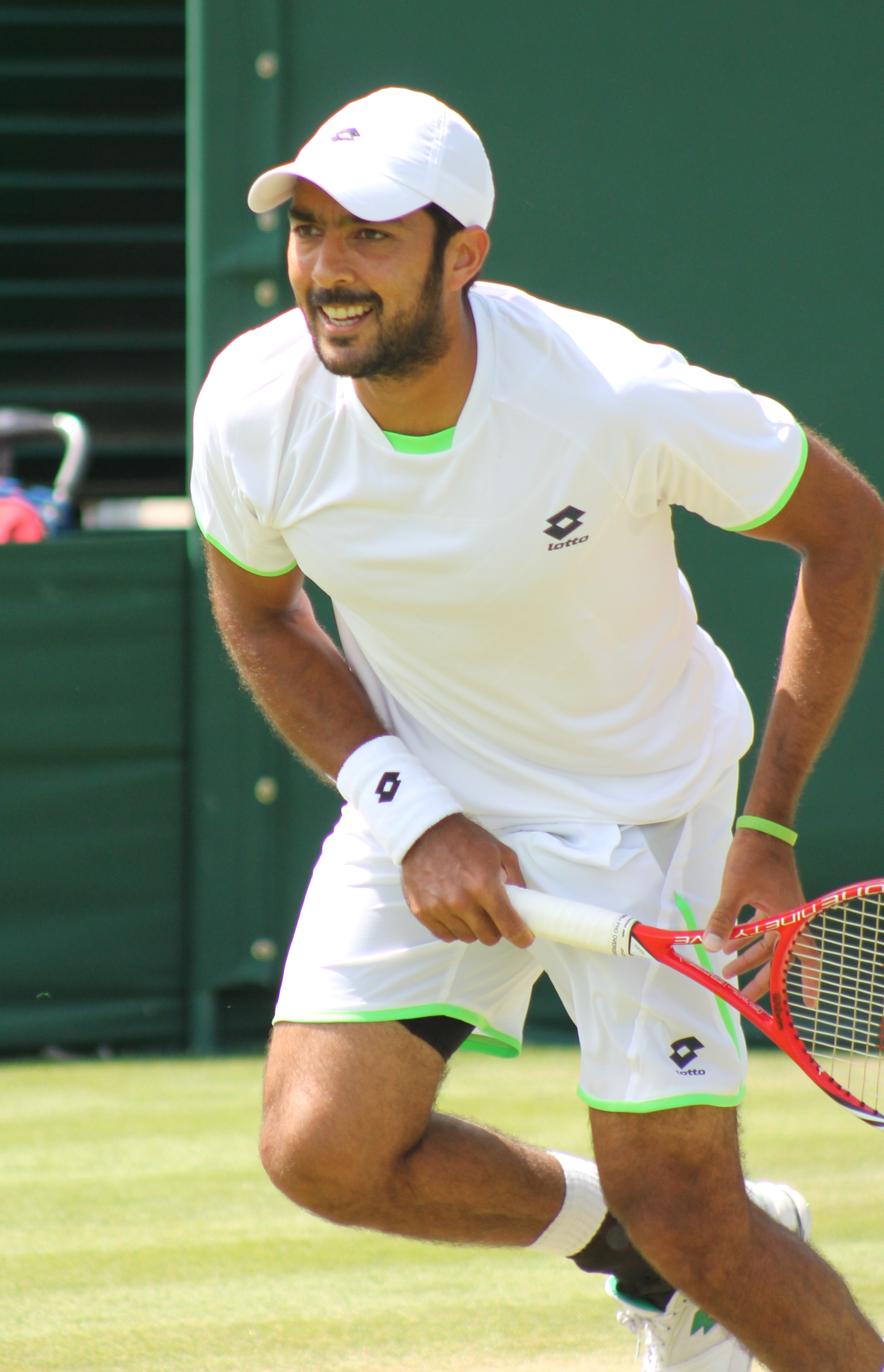 Qureshi WM13-013